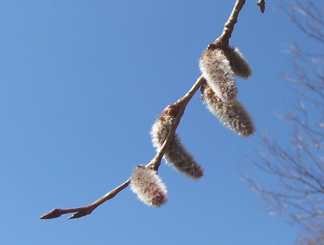 Populus tremula (pl.topola osika)